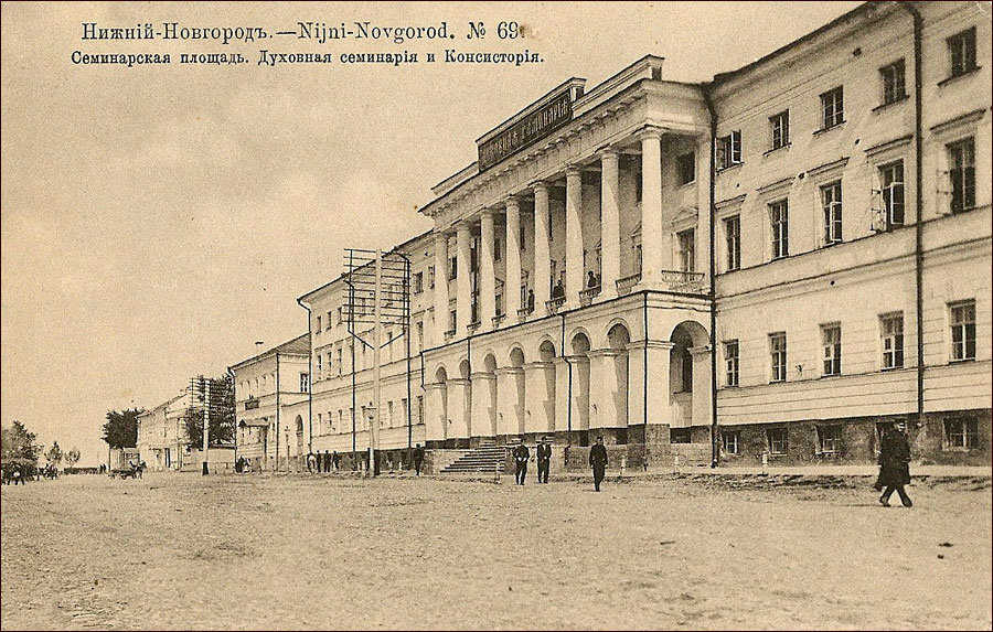 Здание Нижегородской семинарии